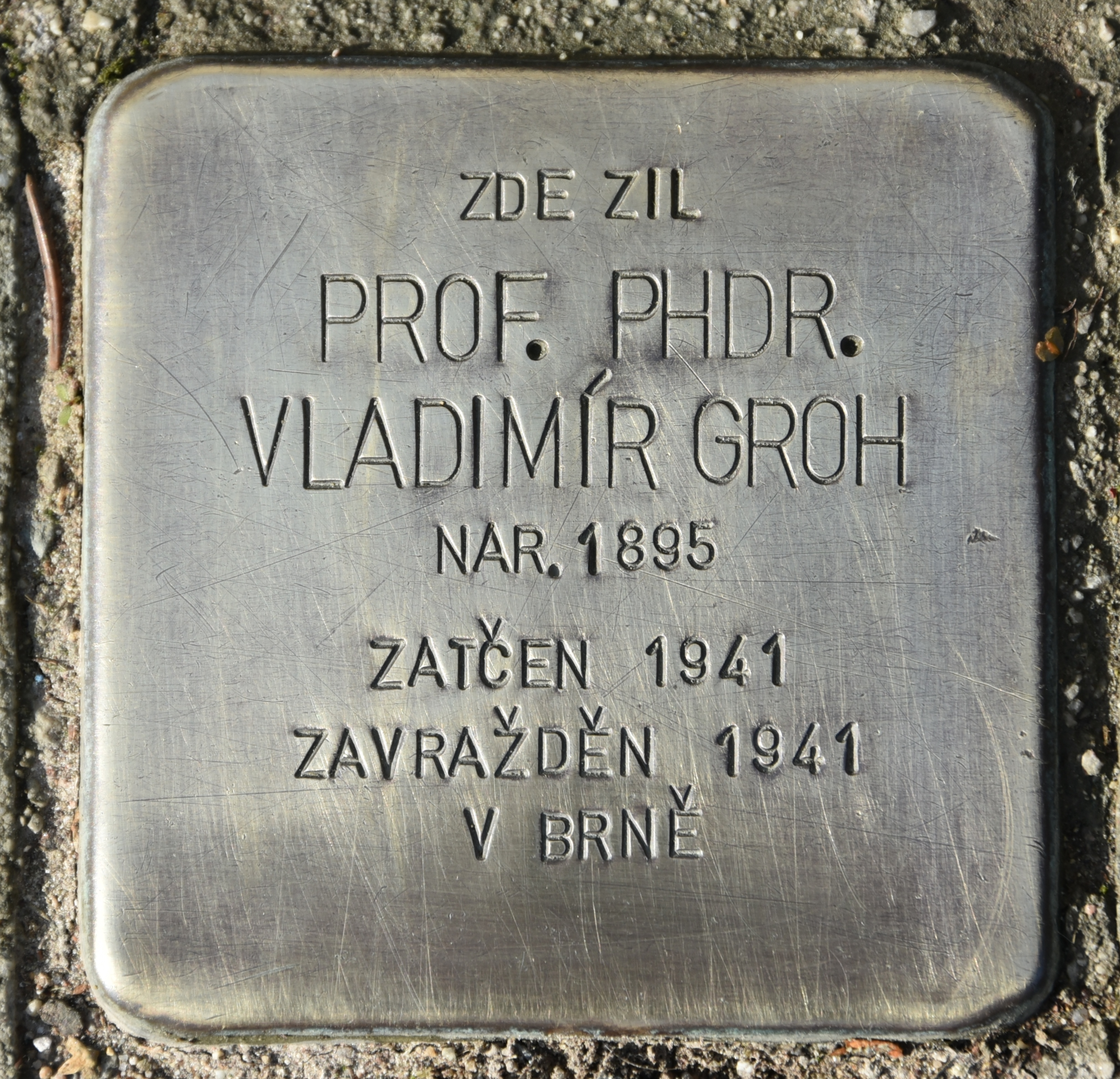 Stolperstein für Vladimir Groh